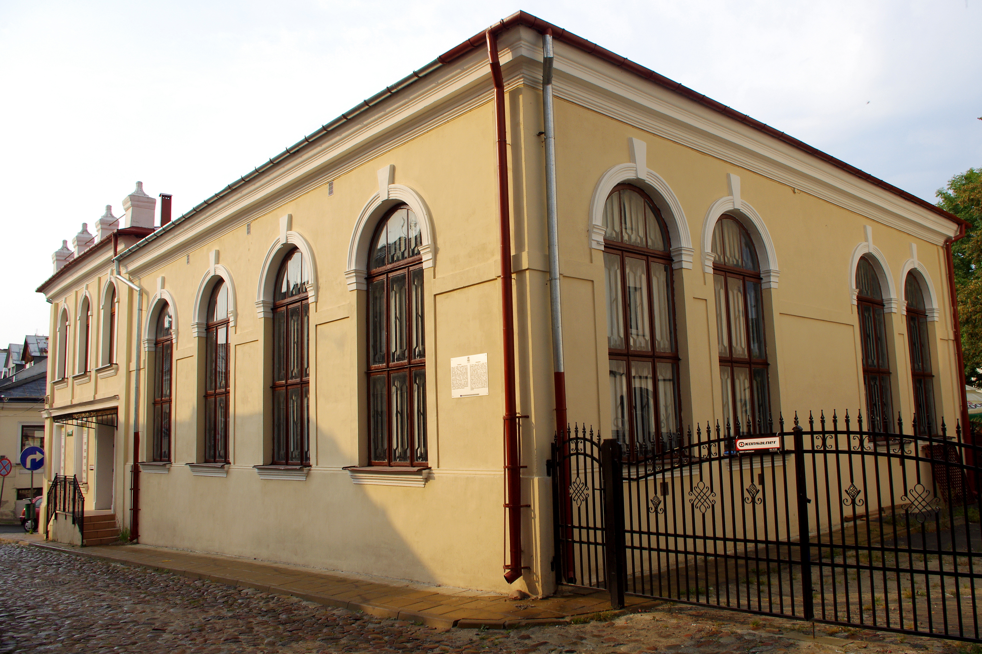 Mała Synagoga - Chełm, ul.Kopernika 8.